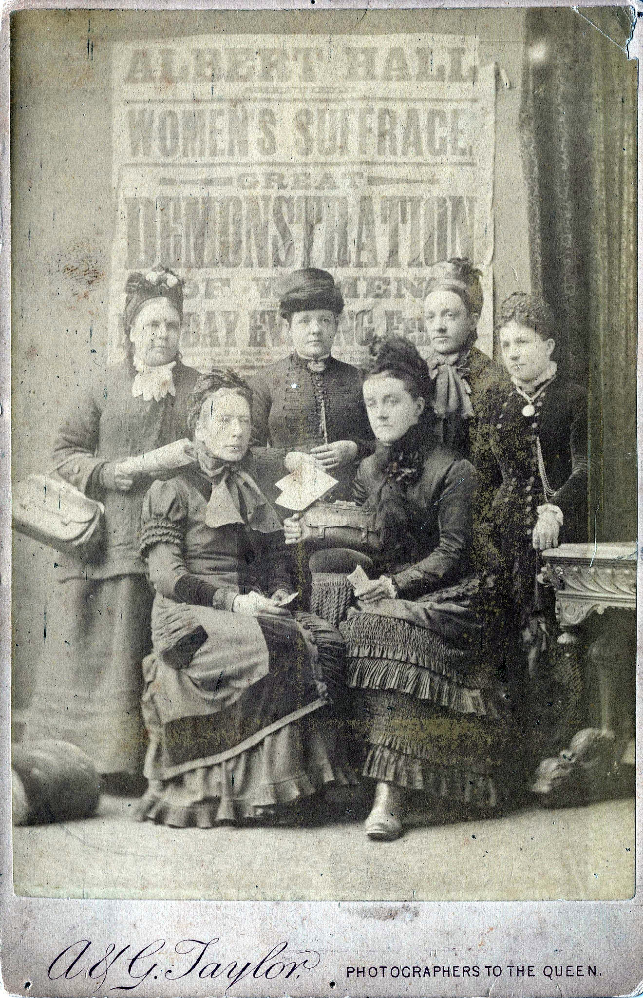 twl 2004 145a